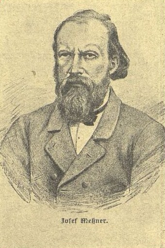 Es handelt sich um das einzige Bild, welches vom Autor existiert